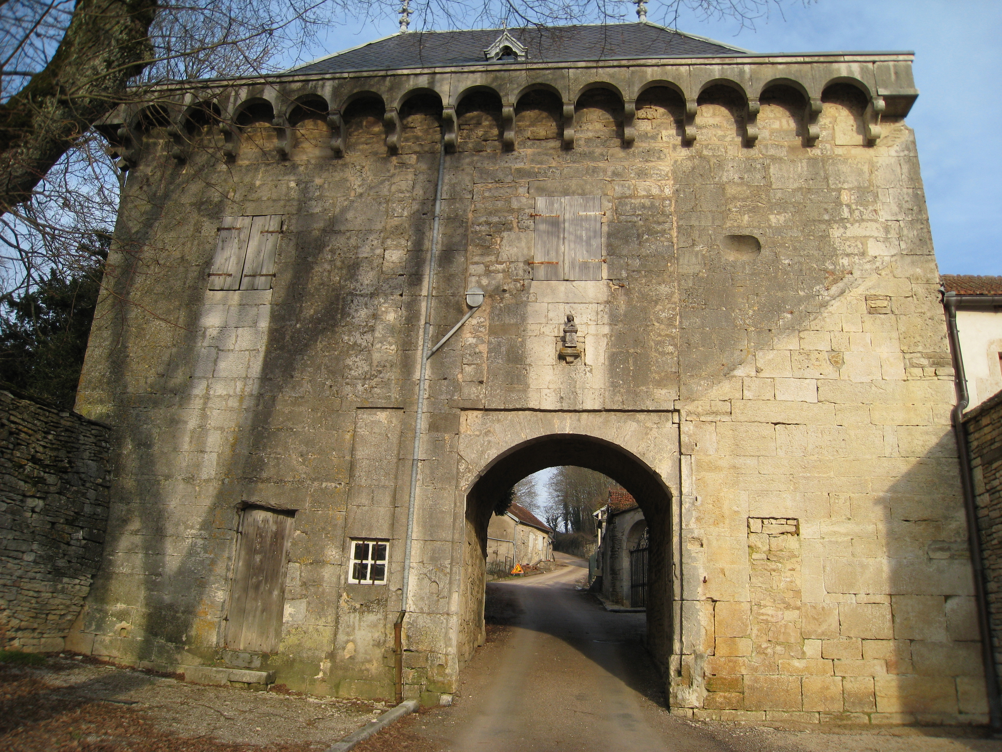 porte fortifiée de Montsaugeon